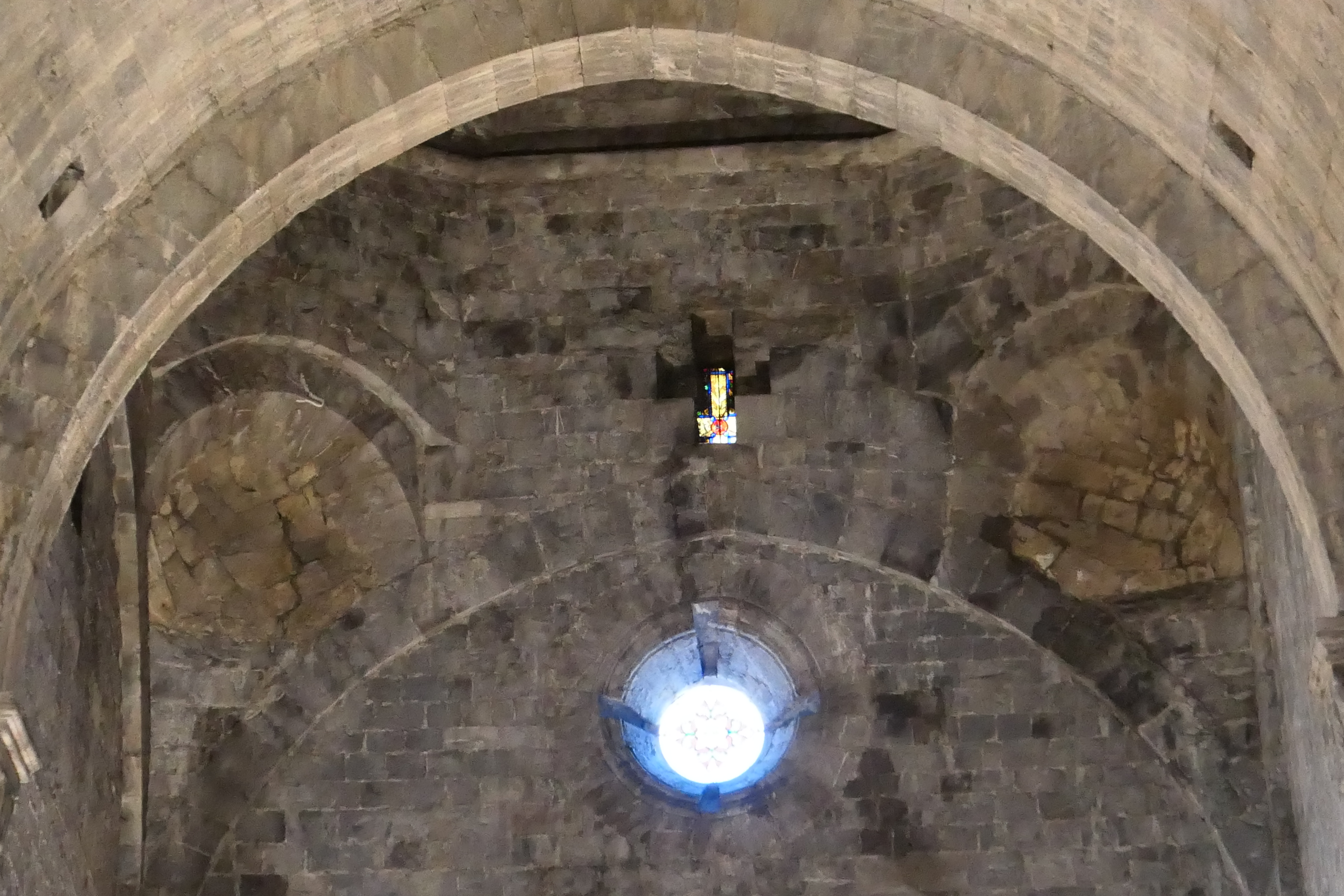 Cathédrale Notre-Dame-des-Pommiers de Sisteron Auge